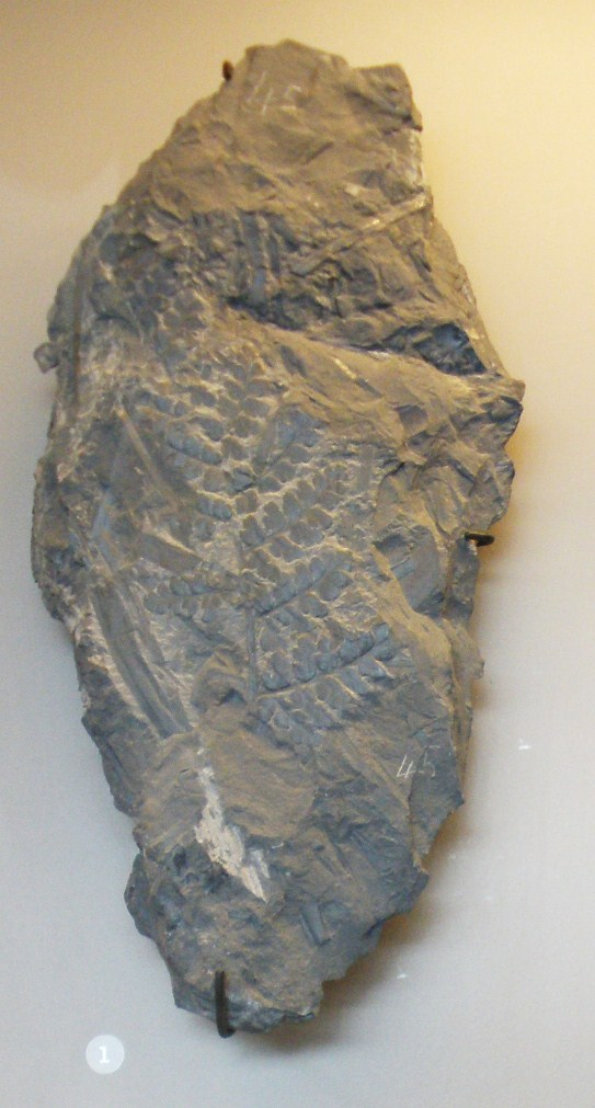 Fossil of Sphenopteris, an extinct plant Took the photo at Musee d'Histoire Naturelle, Brussels